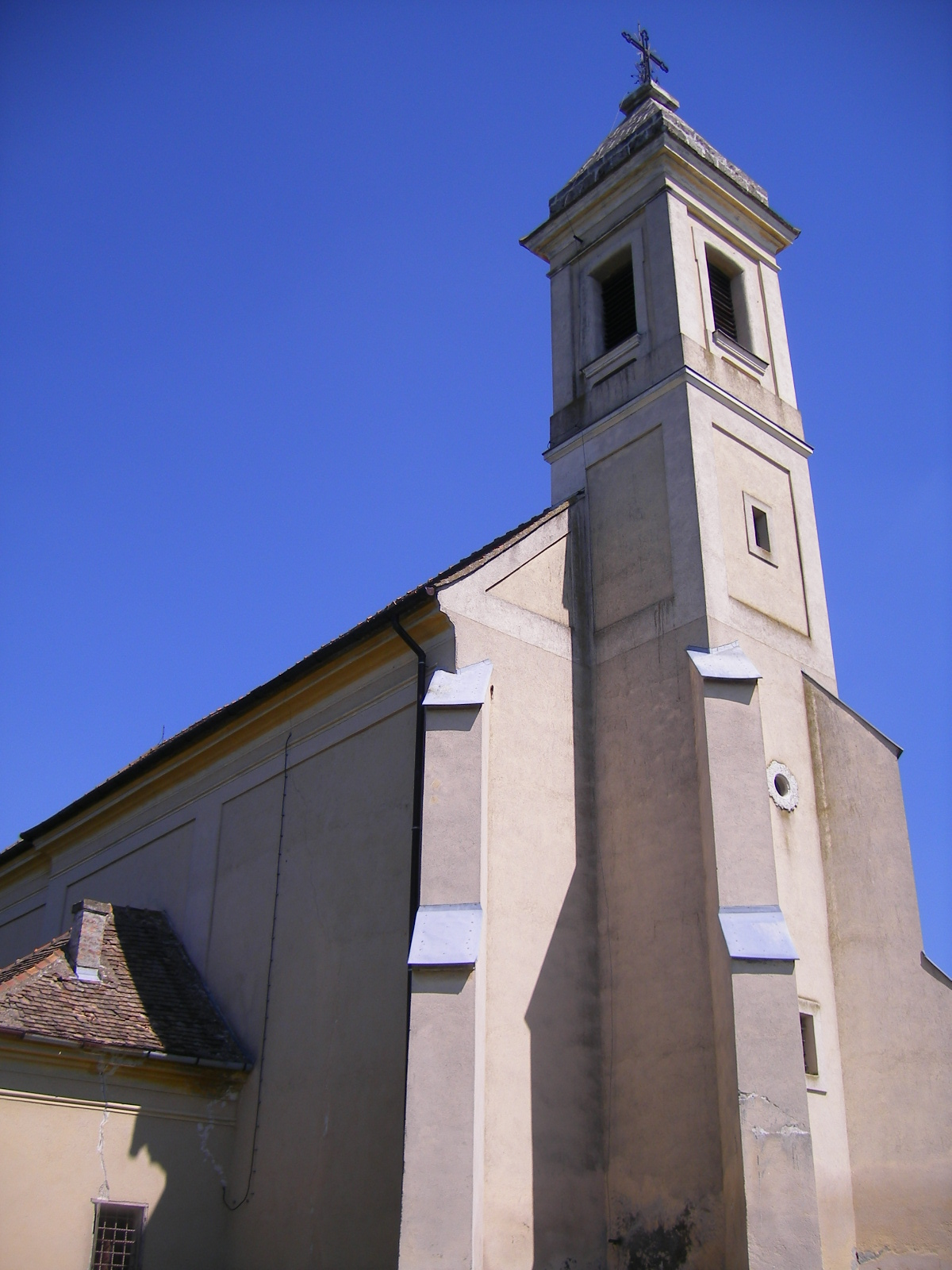 Szákszend - a száki katolikus templom